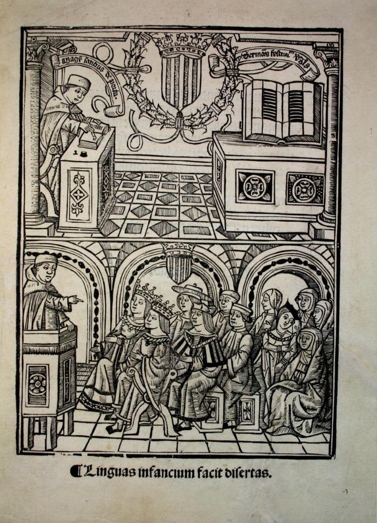 Fray Sancho Porta, O. P. escribiendo y predicando. Grabado xilográfico a la vuelta de la hoja de título de "Sermones festivitatum annualium Beatissime Virginis Mariae: fratris sanctii...". Colofón: Joannis Joffre salutis anno supra millesimum quinçentisimo duodecio... In coronata hyspaniarum urbe Valentie... [Juan Jofre, Valencia, 1512]. Estampa suelta procedente de la colección de Valentín Carderera conservada en el Museo Lázaro Galdiano.